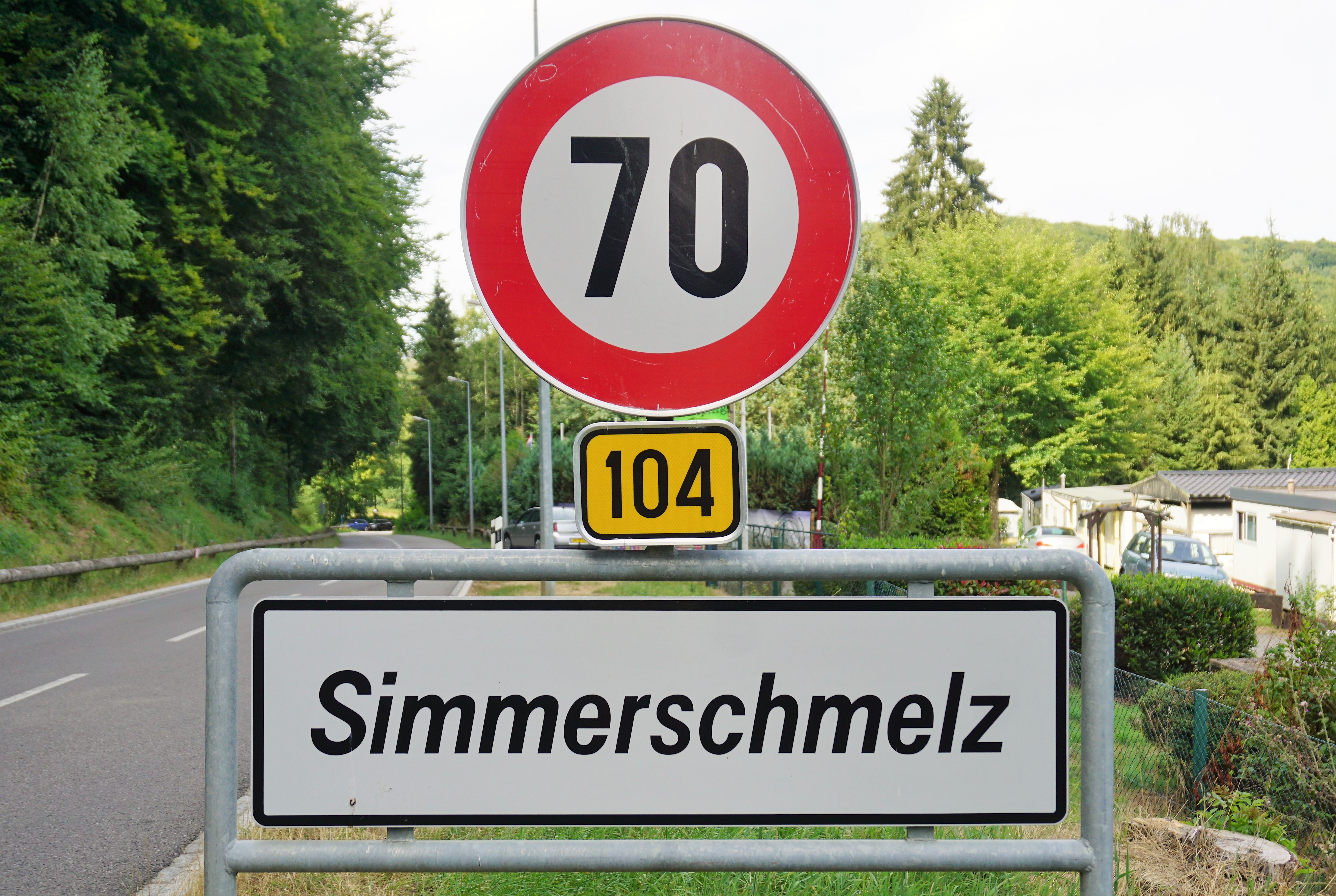 Lieu-dit Simmerschmelz, commune de Habscht. Panneau de localisation.